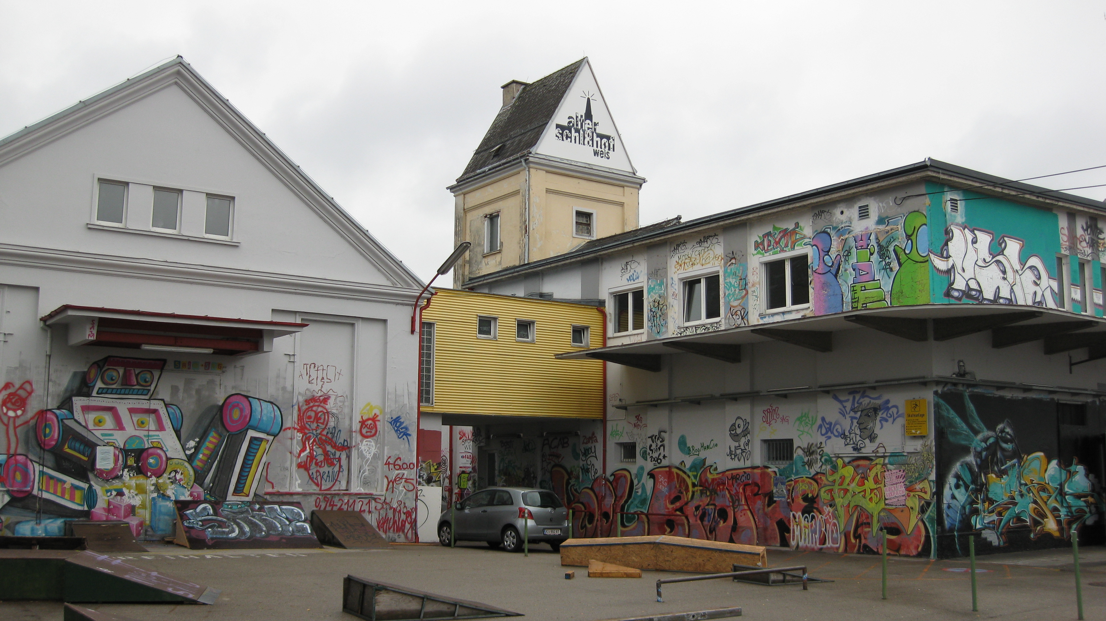 Schlachthof